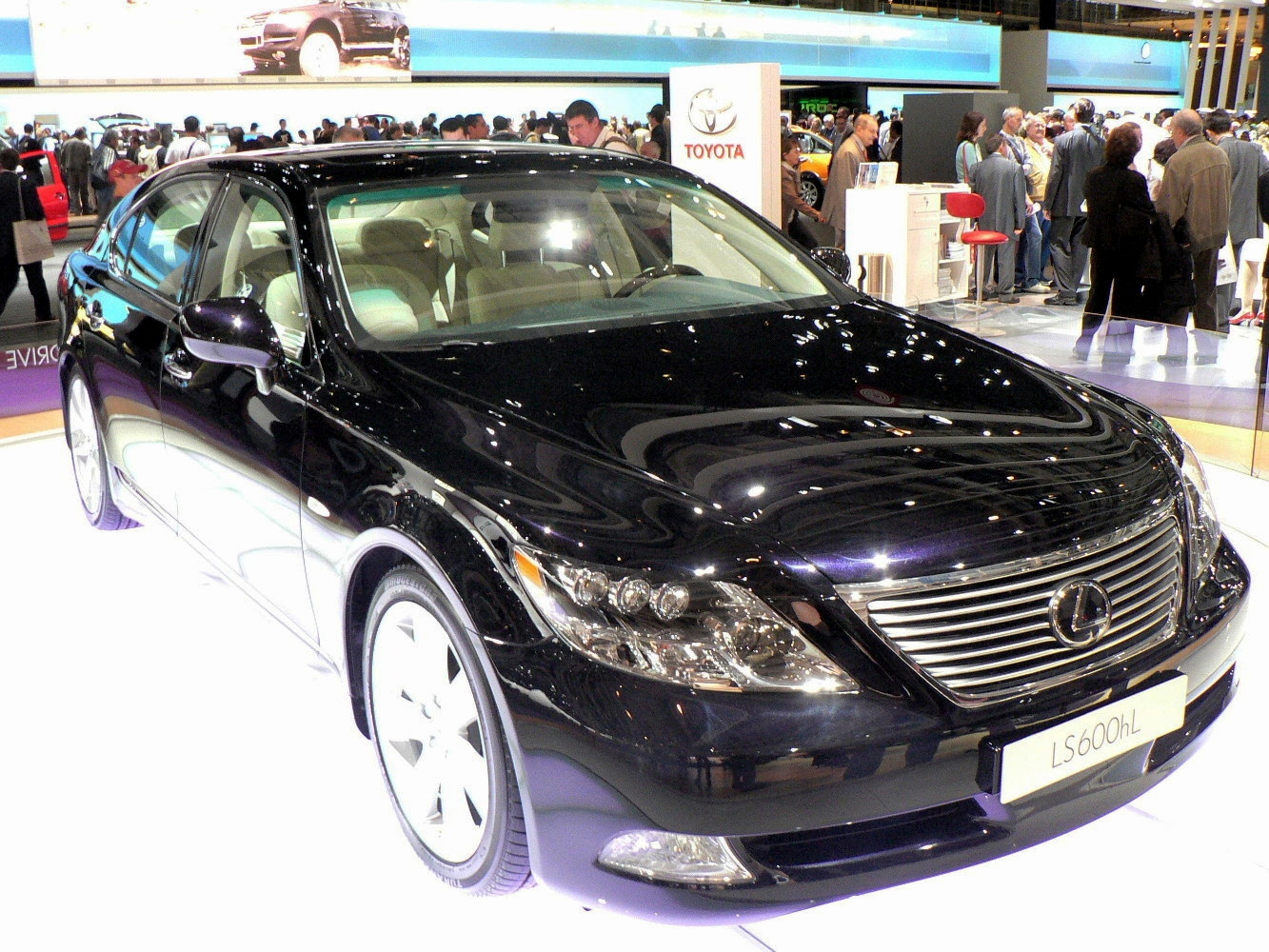 Mondial de l automobile de Paris (October 2006)